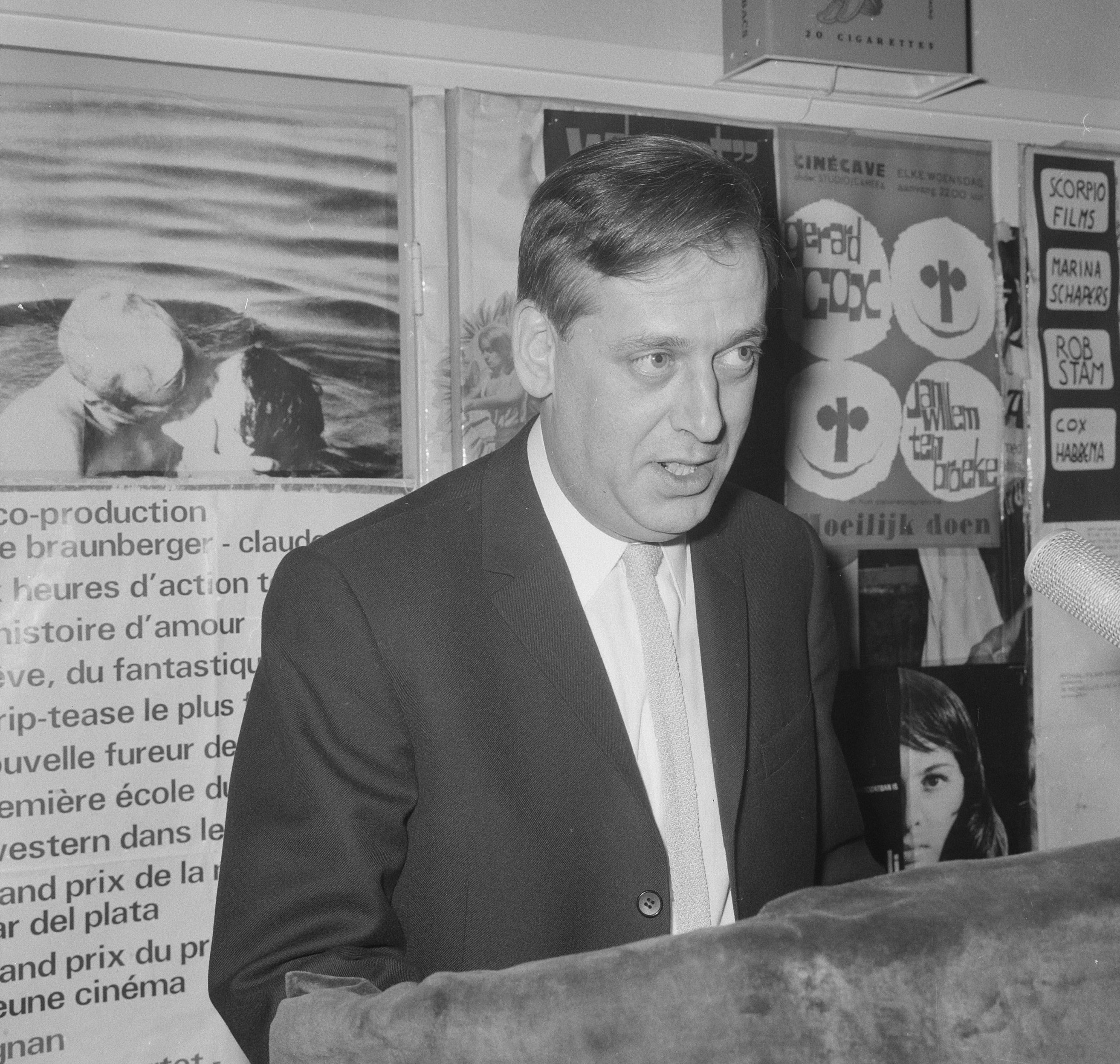 Graadt van Roggenprijs voor Jan Blokker , Jan Blokker, 1 februari 1966